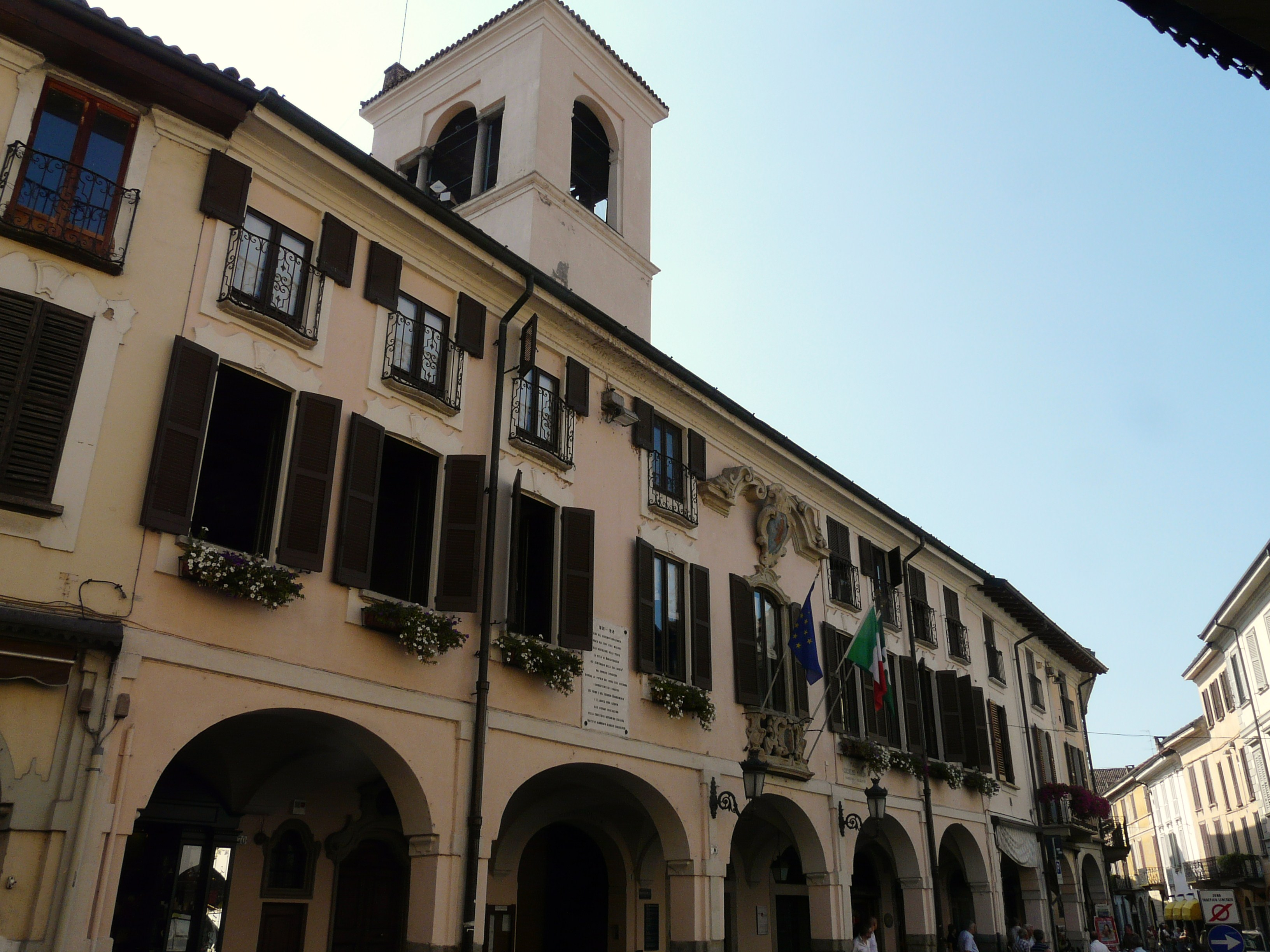 Municipio di Abbiategrasso, Lombardia, Italia